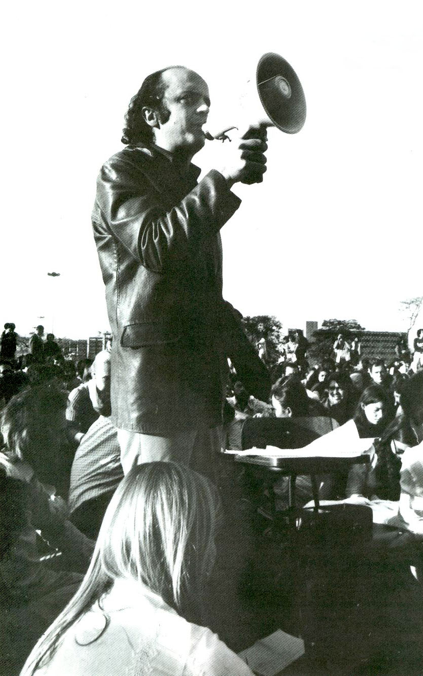 José Serra no 3º Congresso SBPC em 1978.